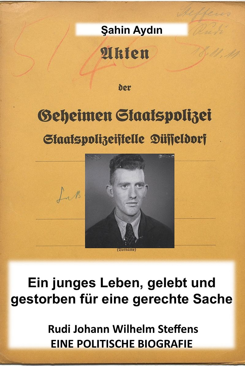 Broschüre von Sahen Aydin über Rudi Steffens / Gronau Westfalken